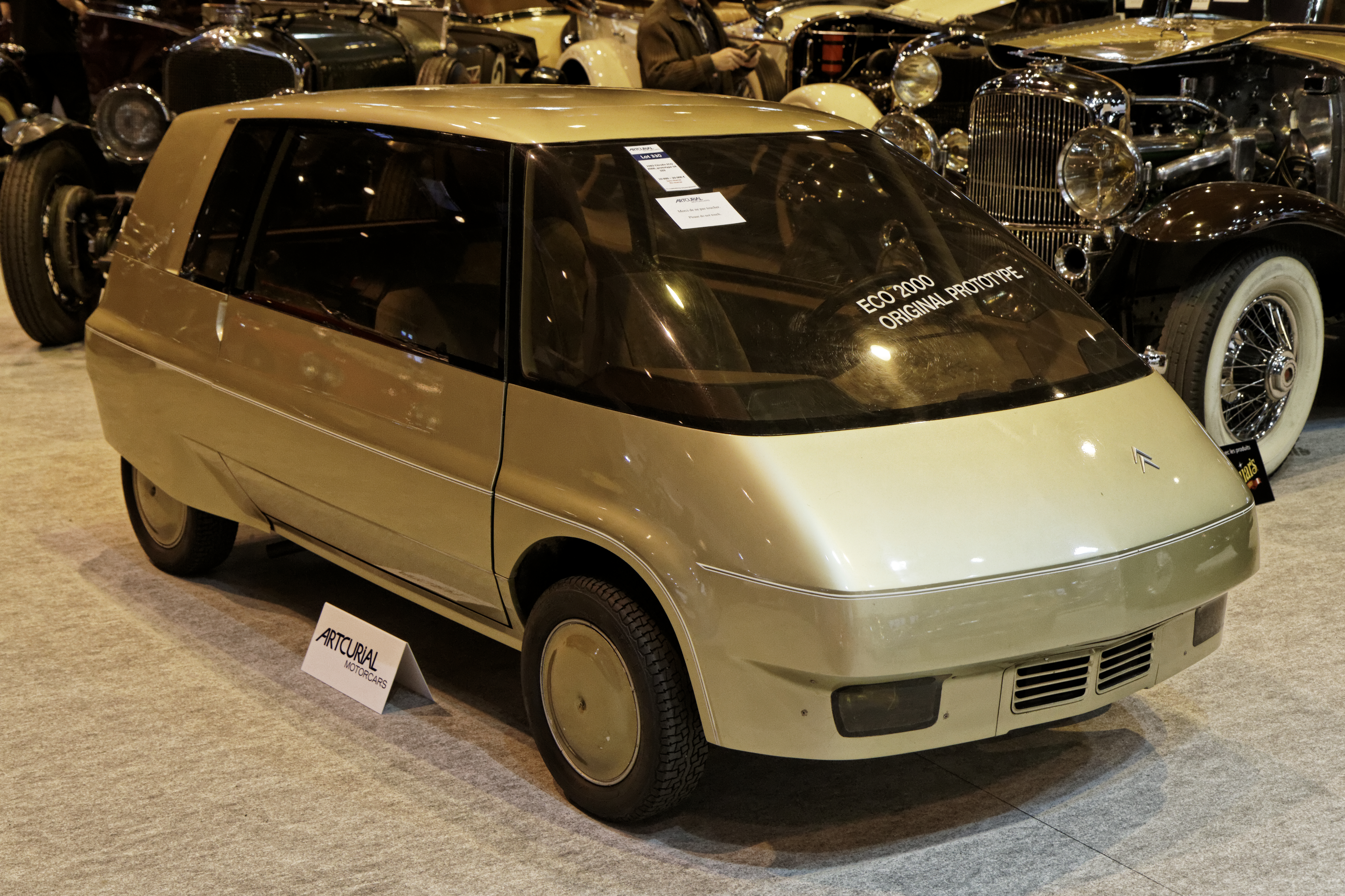 Une Citroën ECO 2000 prototype SA 103 exposée lors du salon Retromobile 2014